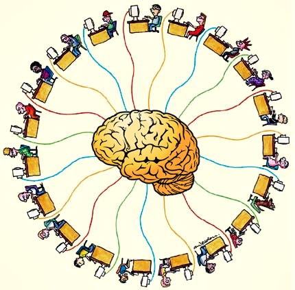 Contribuição de cada individuo com suas idiossincrasias resultando na consciência coletiva.